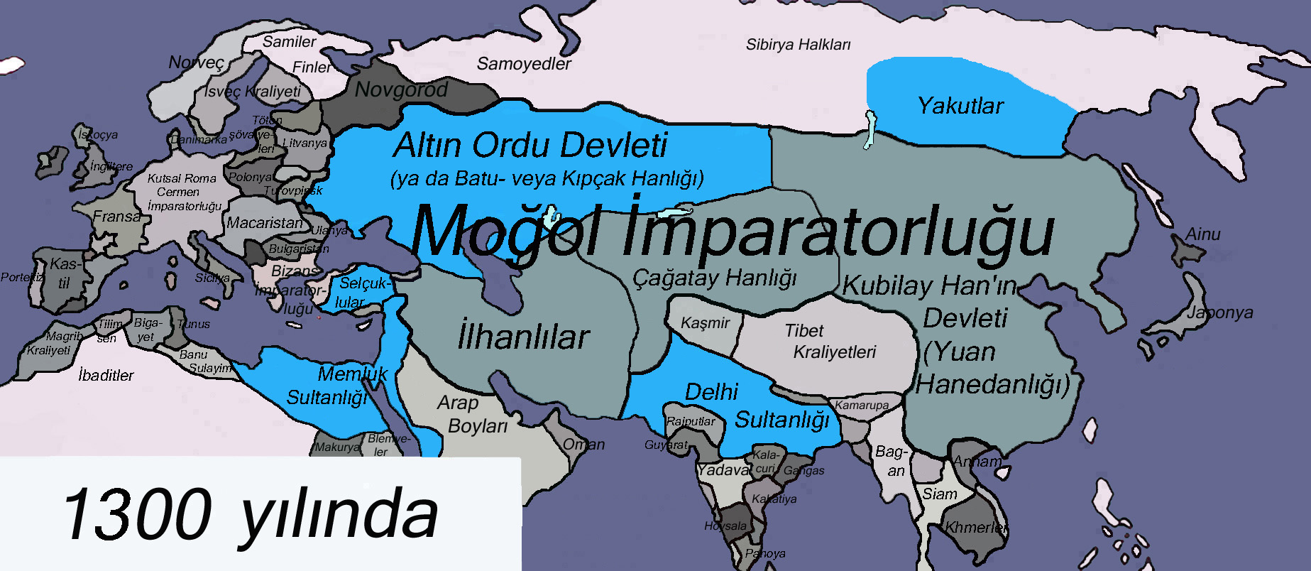 Kaynak: Jean-Paul Roux'un Türklerin Tarihi (İSBN 975-997-091-0) adlı kitabındaki tariflerine göre kendim ürettim.